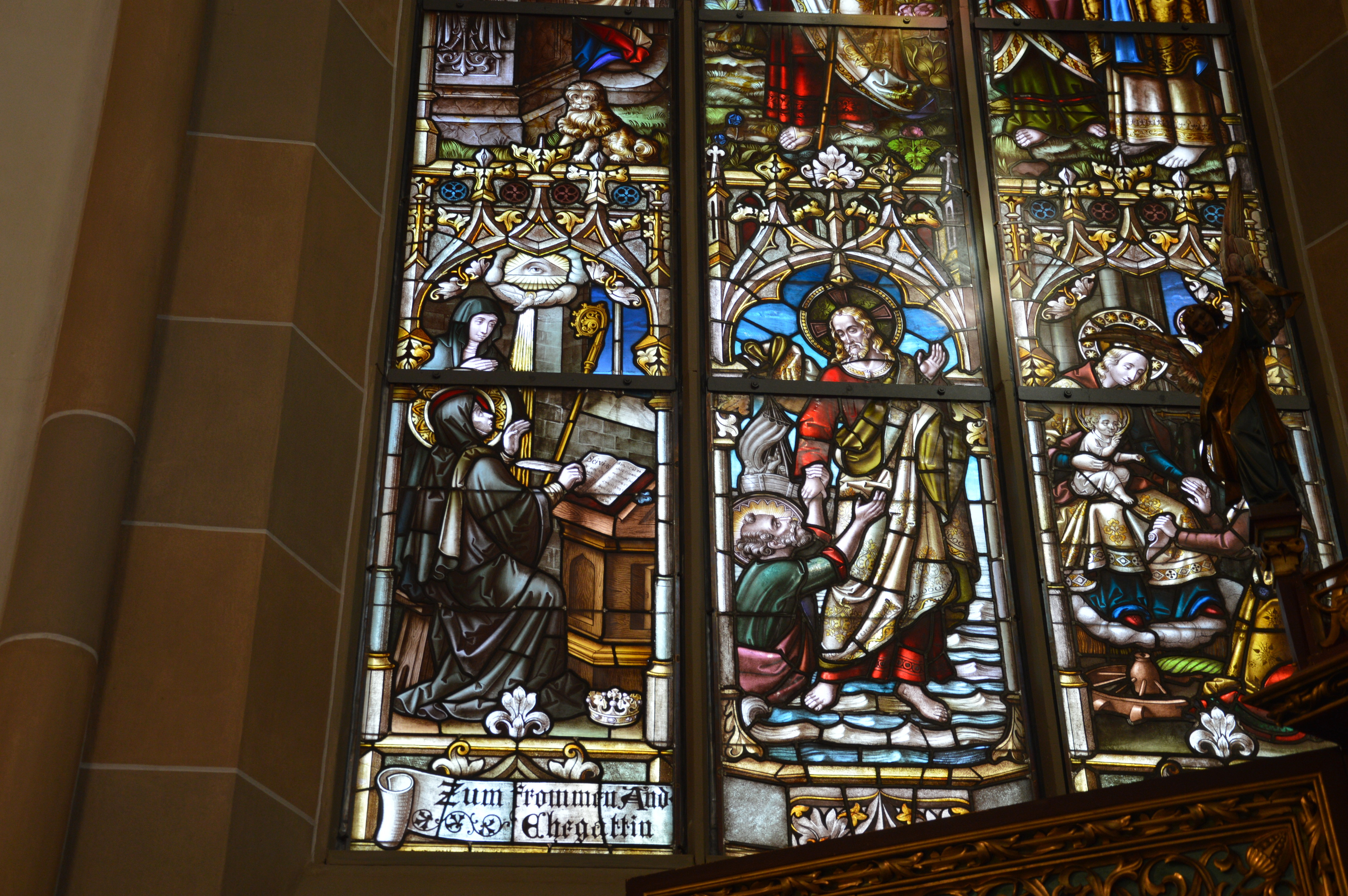 Kirchenfenster mit Hildegard von Bingen in Bad Sobernheim.jpg